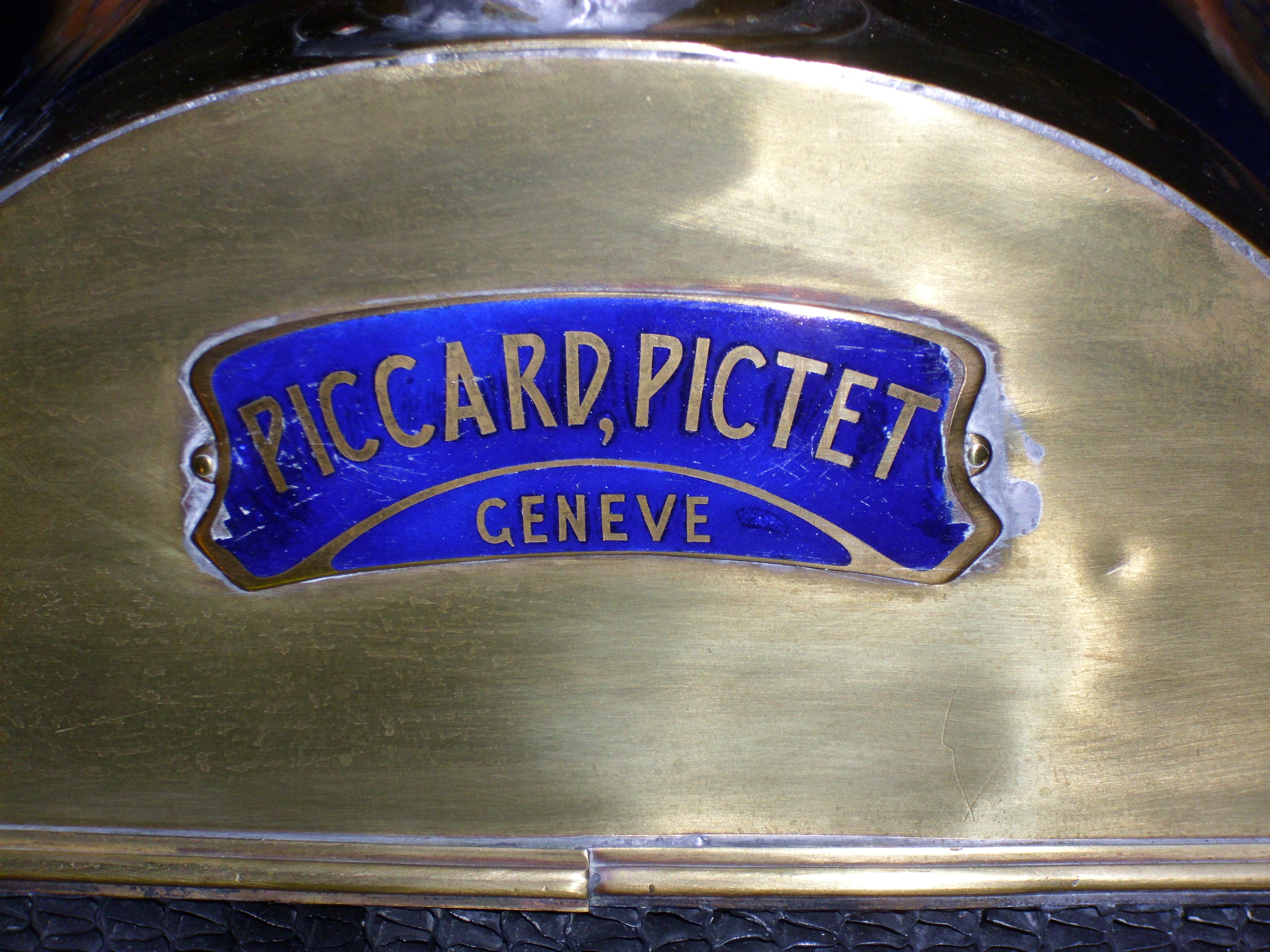 Emblem Pic-Pic